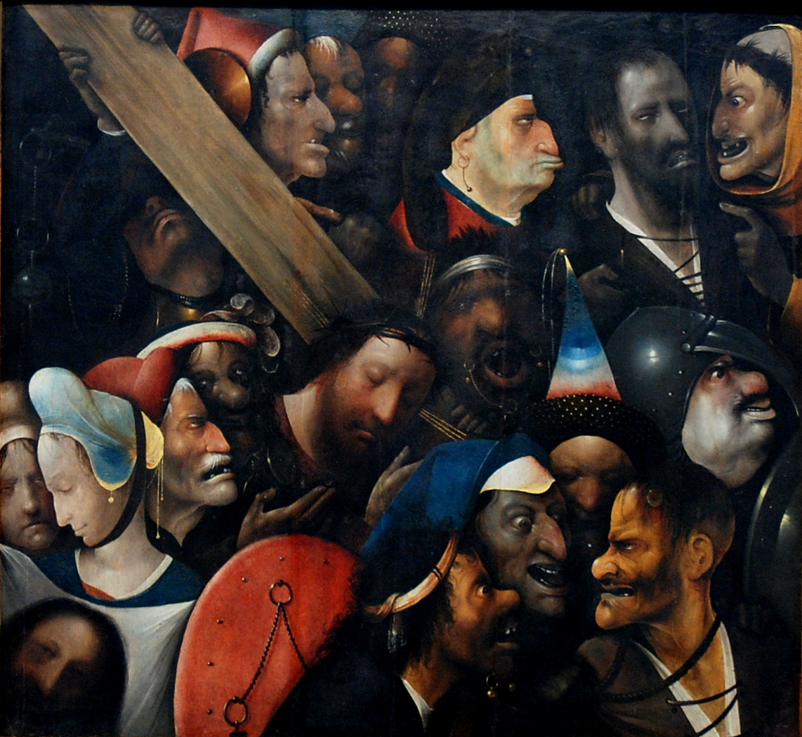 Jeroen Bosch (1450-1516) - De kruisdraging - MSK Gent